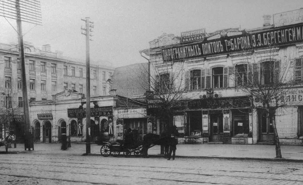 Ростов-на-Дону в начале XX века. Угол Большой Садовой улицы и Казанского переулка (сейчас переулок Газетный) в 1911 году.